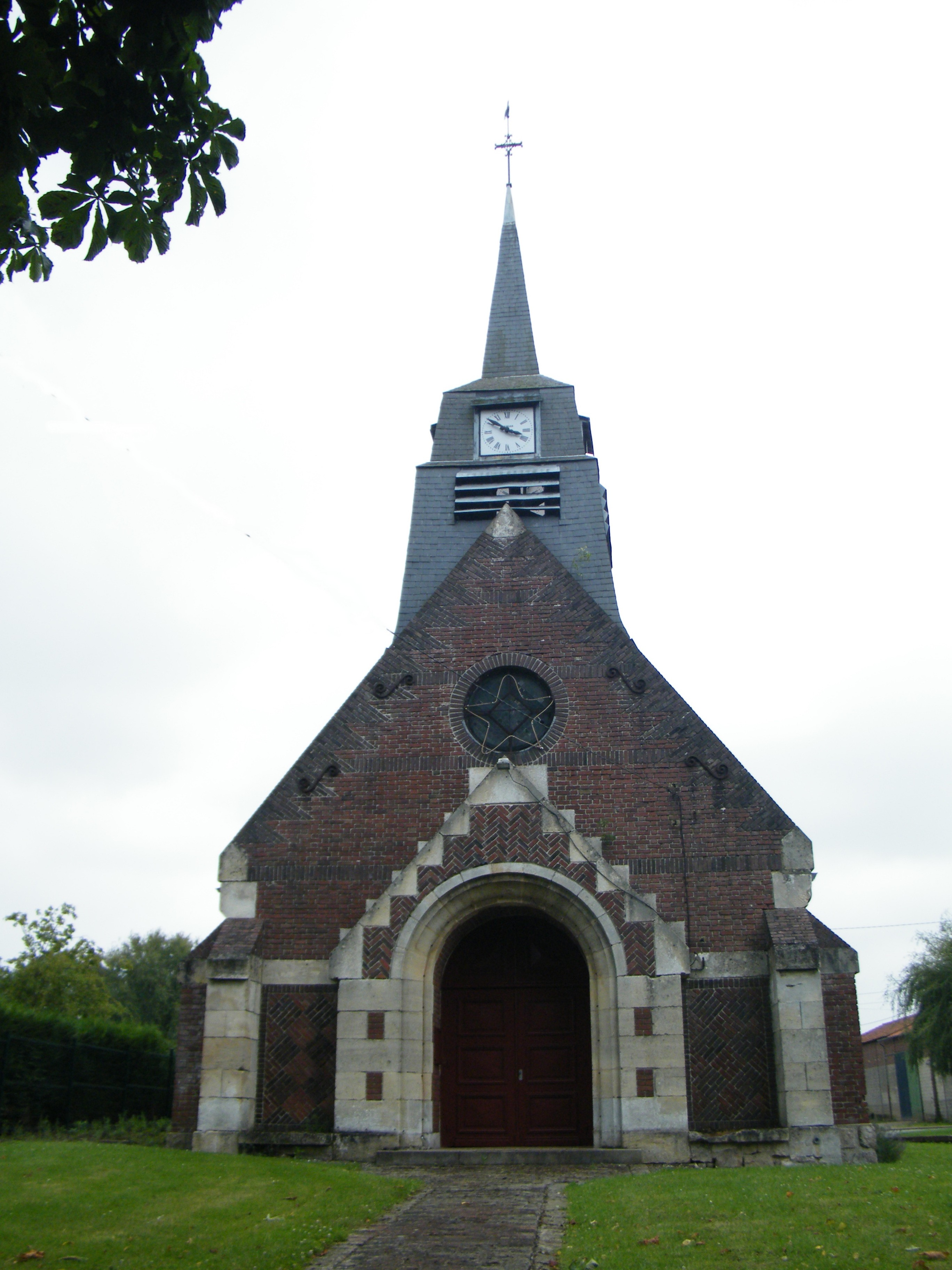 Église Saint-Léger